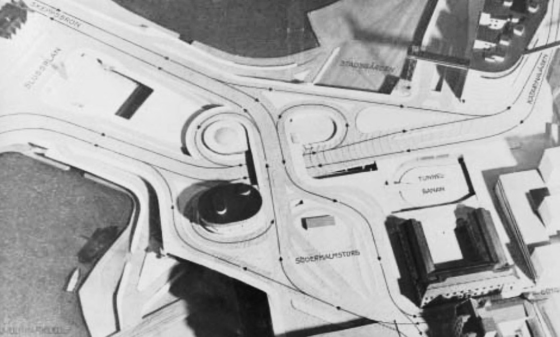 Modell över Slussen med körriktningar (norr är till vänster)